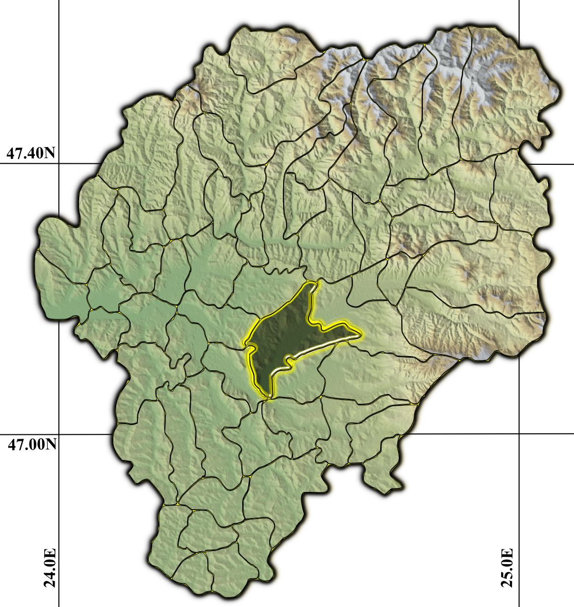 Bistrita jud Bistrita-Nasaud.png